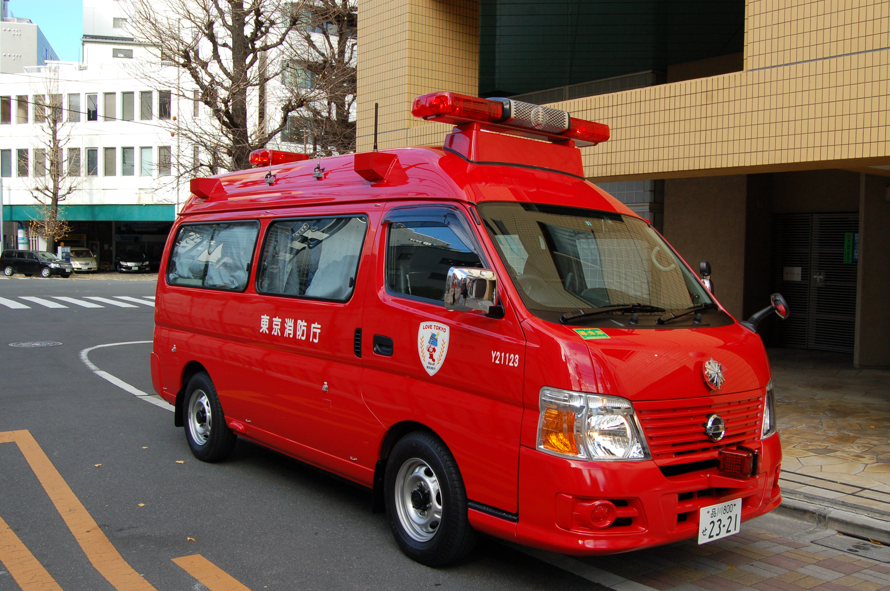 東京消防庁神田消防署神田指揮1